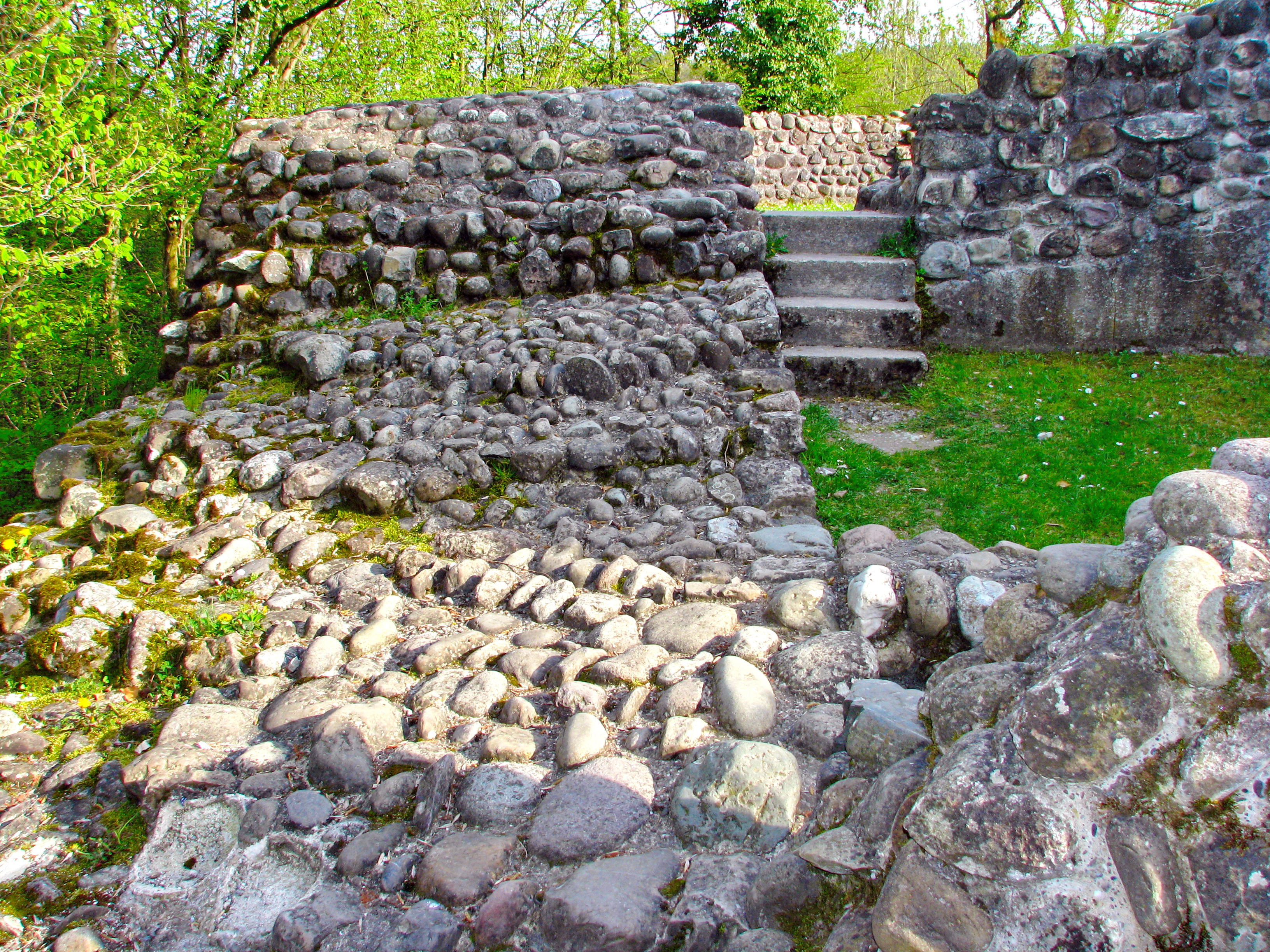 Altburg (Alt-Regensberg) in Regensdorf (ZH)